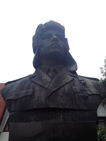 Busta Stěpana Vajdy v ukrajinském Dulovu